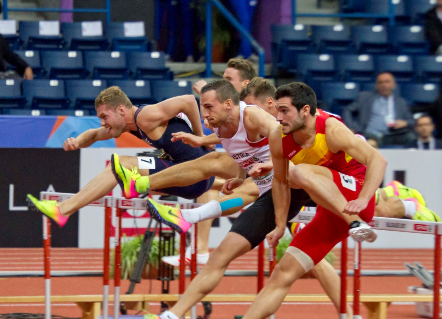 266 hept 60mH mayer urena distelb